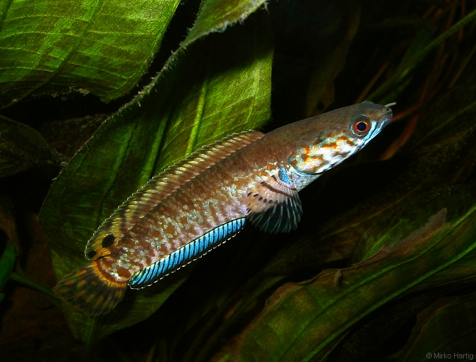 ca. 8 cm langes Jungtier